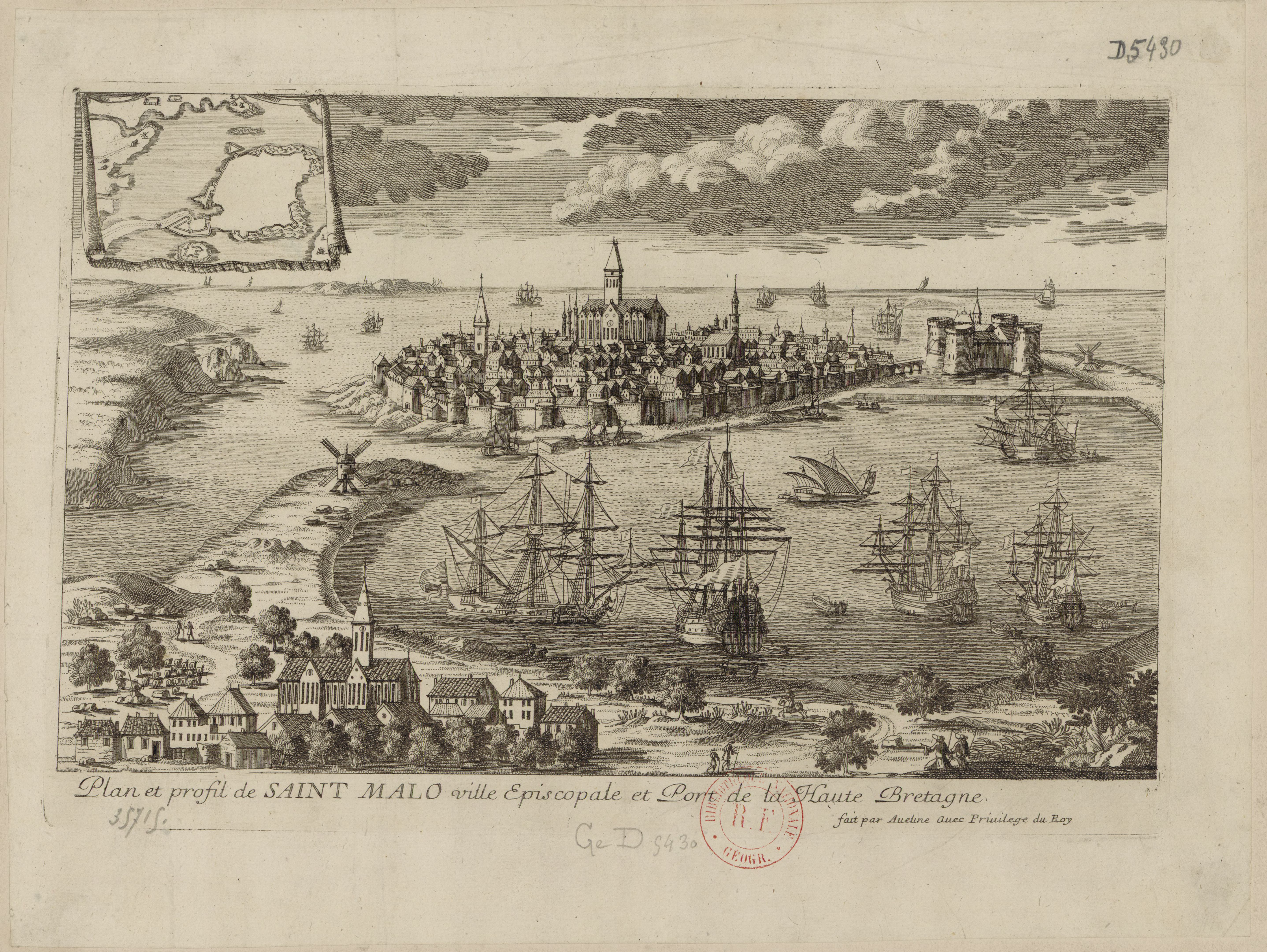 Carte de Saint Malo, date indéterminée (17è ou 18è siècle ?). 31 x 21 cm